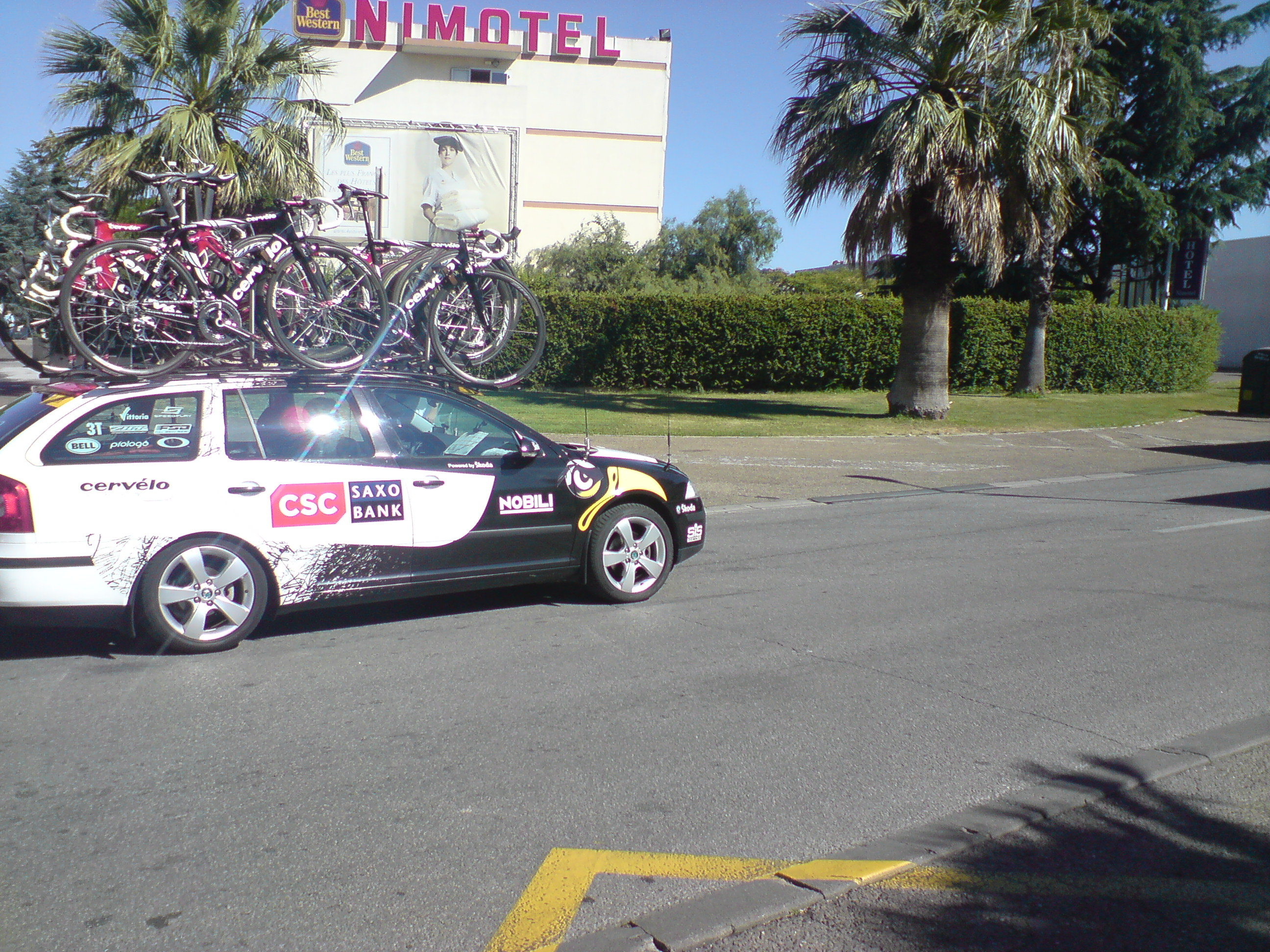 Team CSC-Saxo Bank-bil under Tour de France 2008.